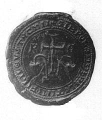 Rátót nb. (II.) Roland nádor pecsétje, 1299